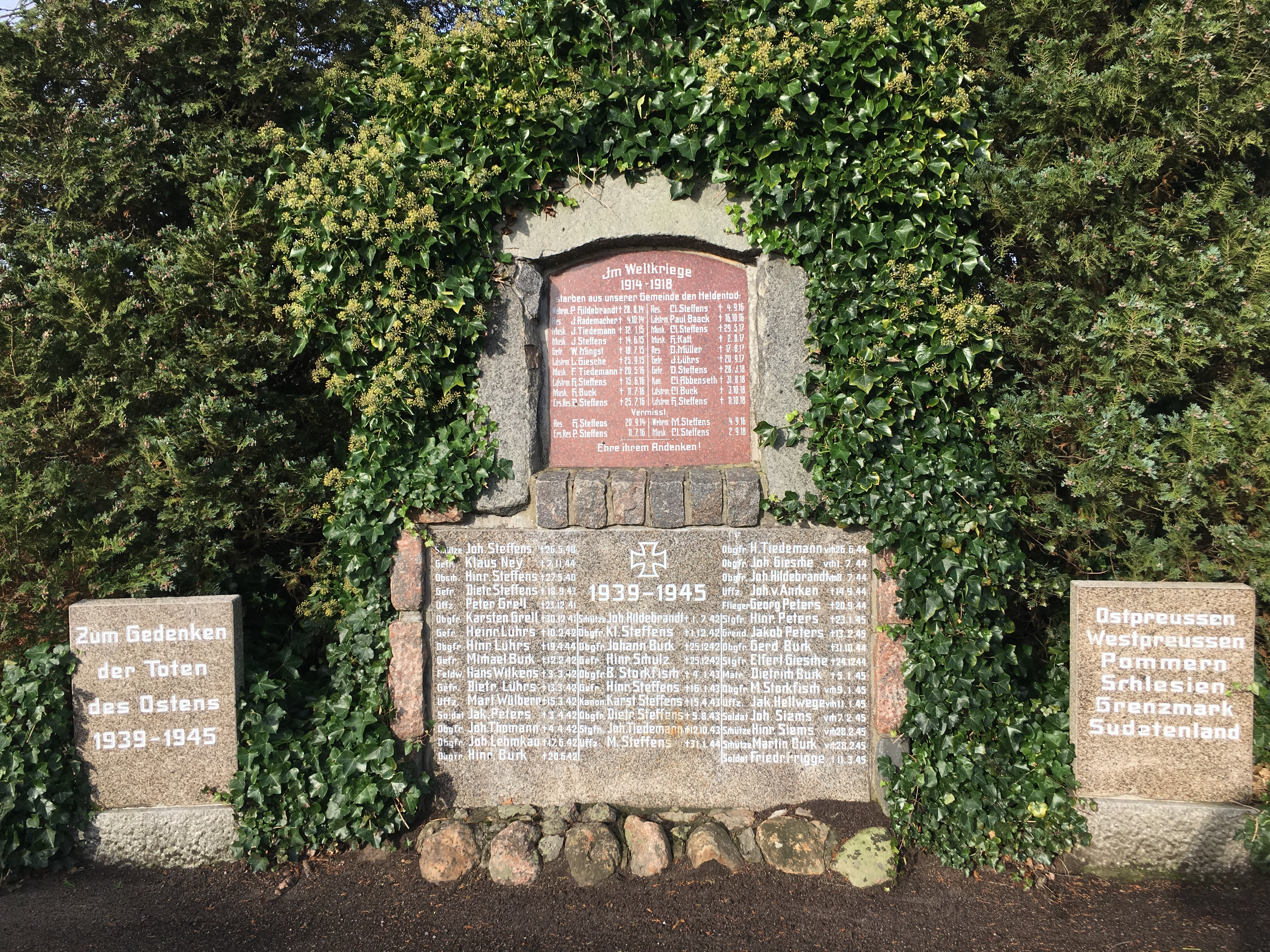 Kriegerdenkmaal in Armsdörp